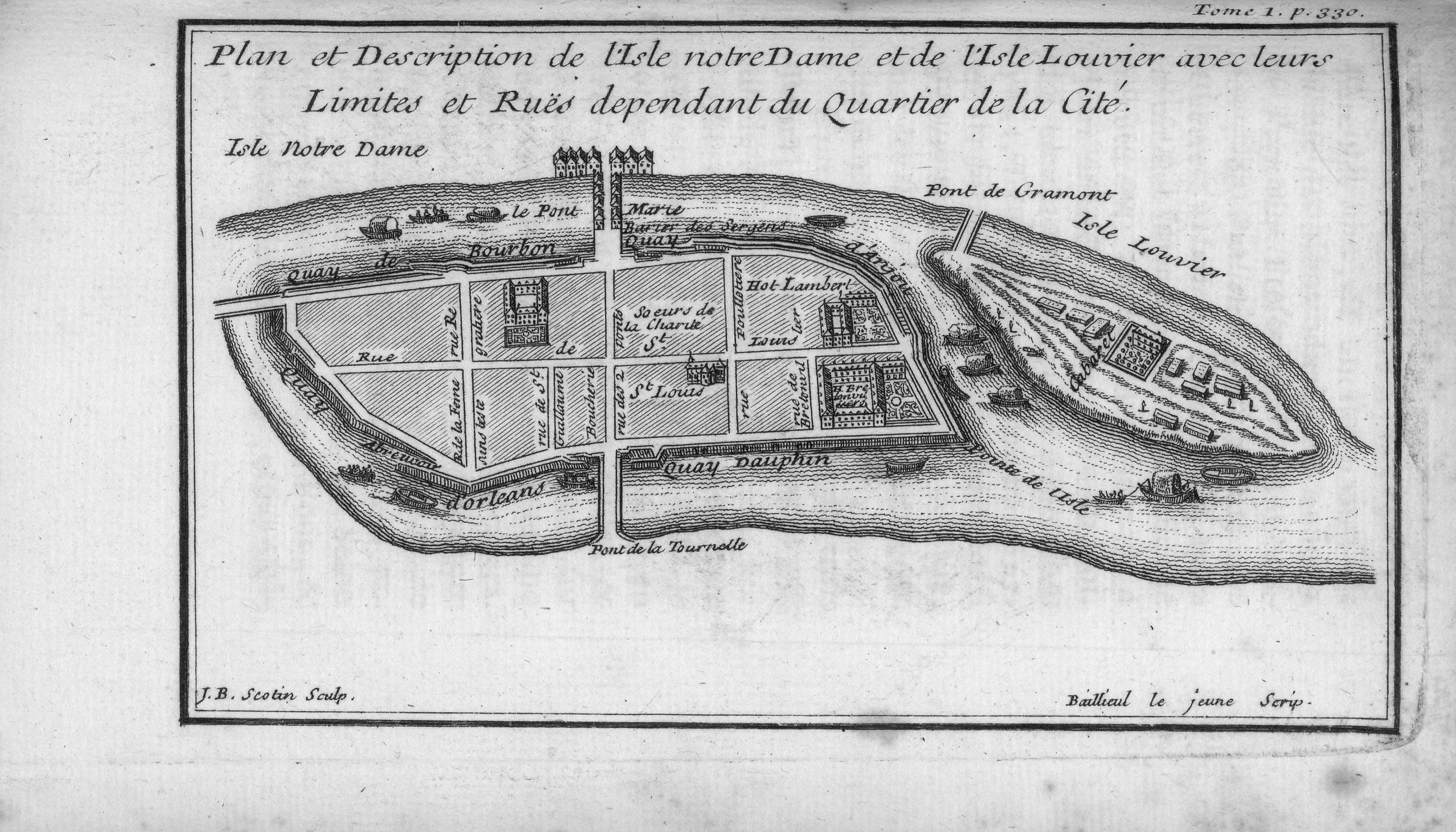 Plan et description de l'ile Notre Dame et de l'ile Louviers avec leurs rues et leurs limites dépendant du quartier de la Cité, par Jean-Baptiste Scotin (1678-?)